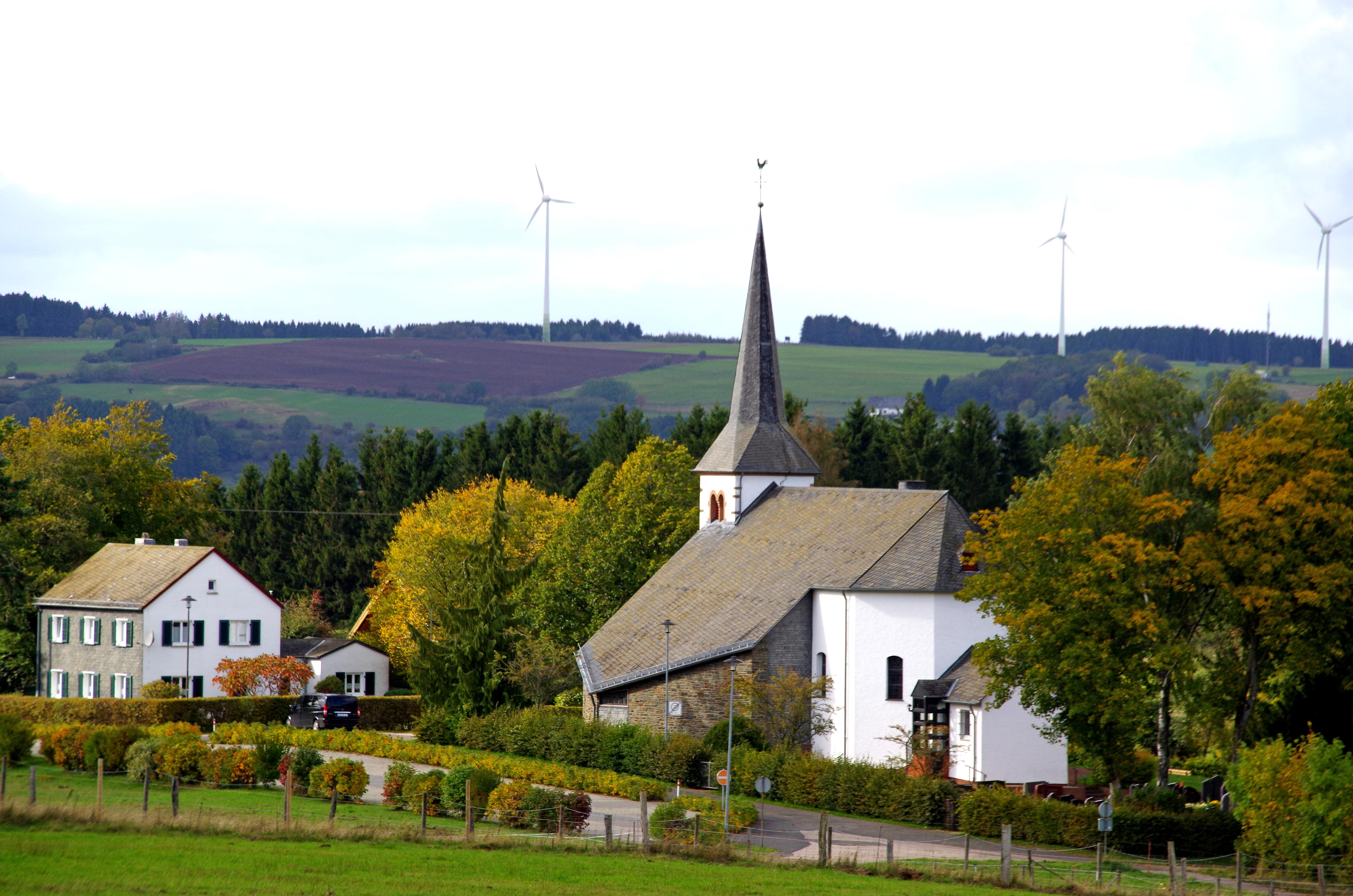 St. Antonius (Kreuzberg), Ortsansicht von Osten